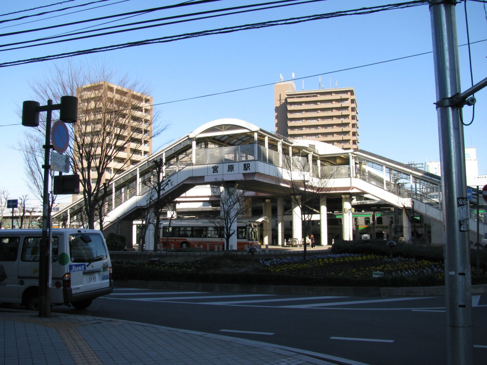 JR宮原駅西口